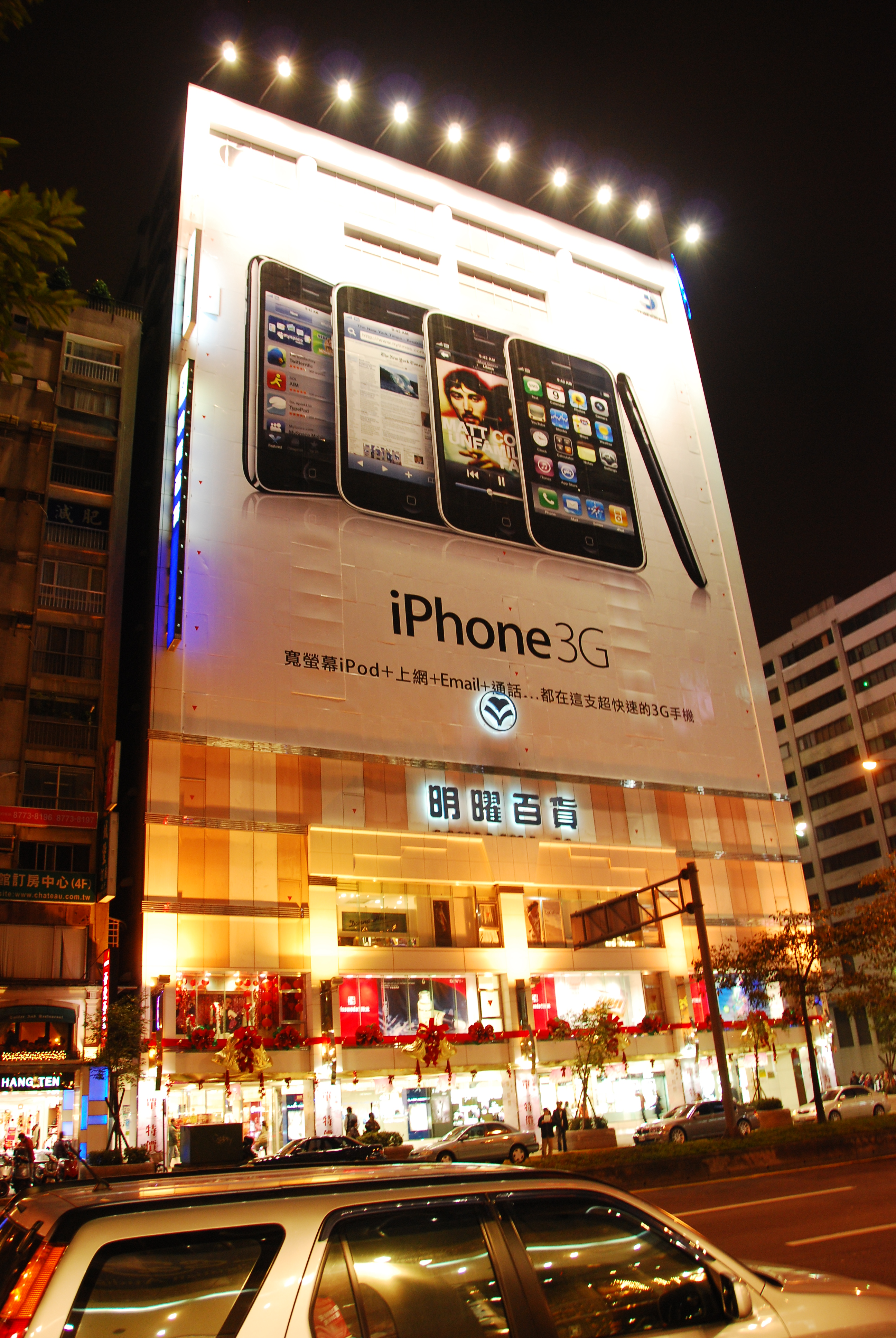 明曜百貨位於台北市大安區忠孝東路四段200號。